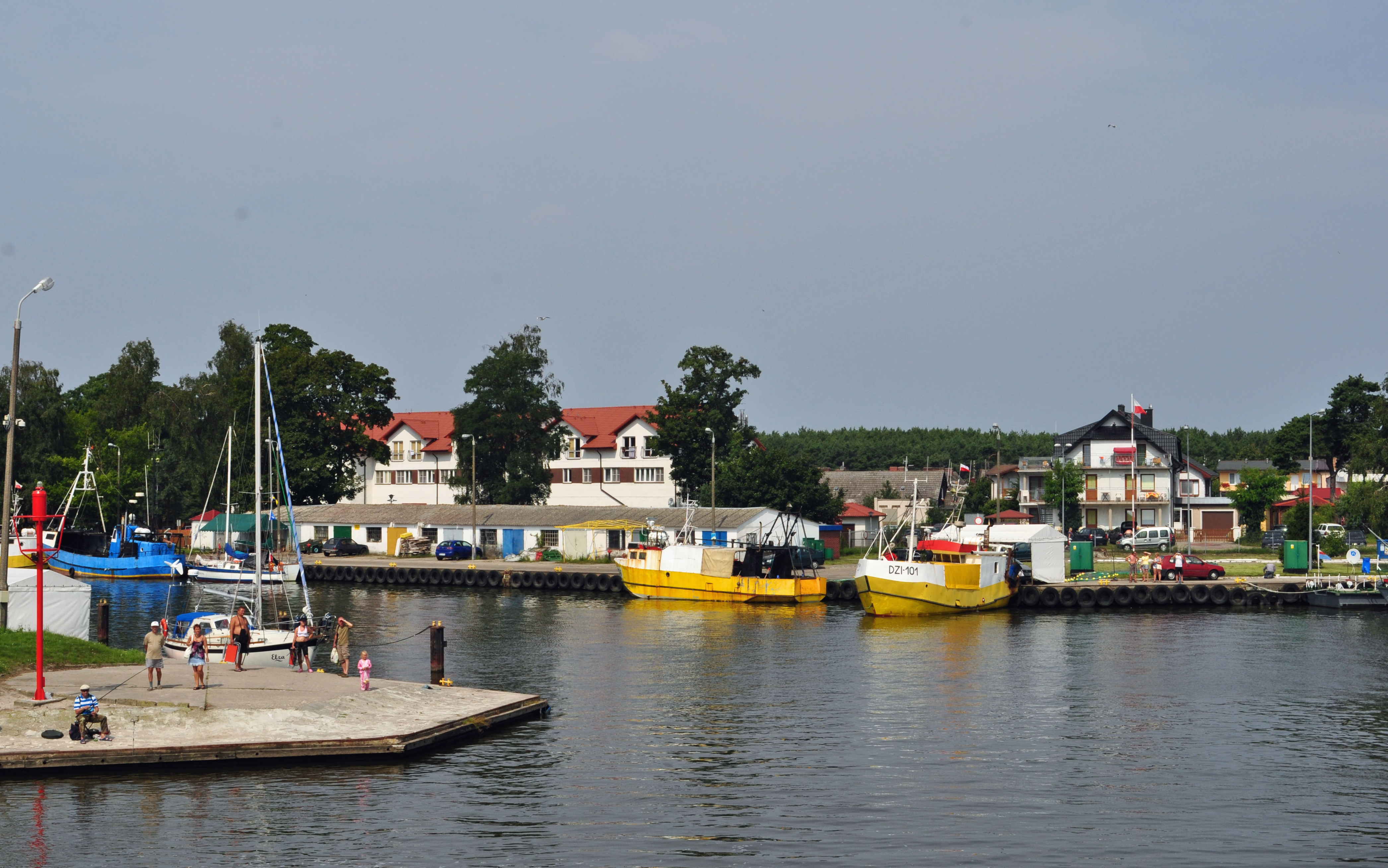 Dziwnów (Powiat Kamieński), e (2011-08-05) by Klugschnacker in Wikipedia